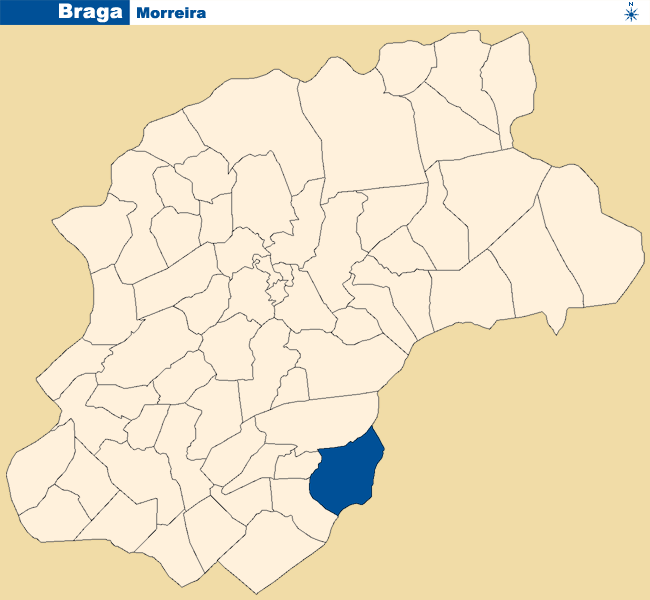 Localização de Morreira no concelho de Braga.